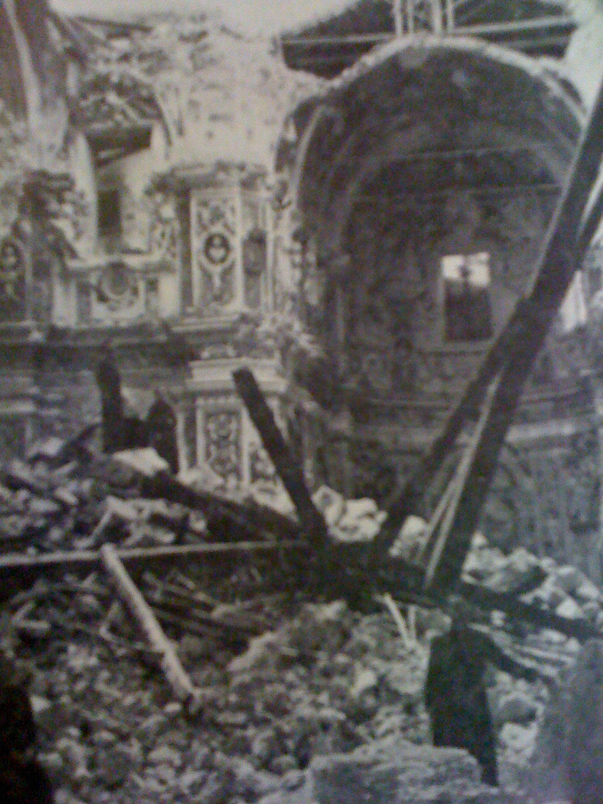 Casa Professa dopo i bombardamenti del 1945